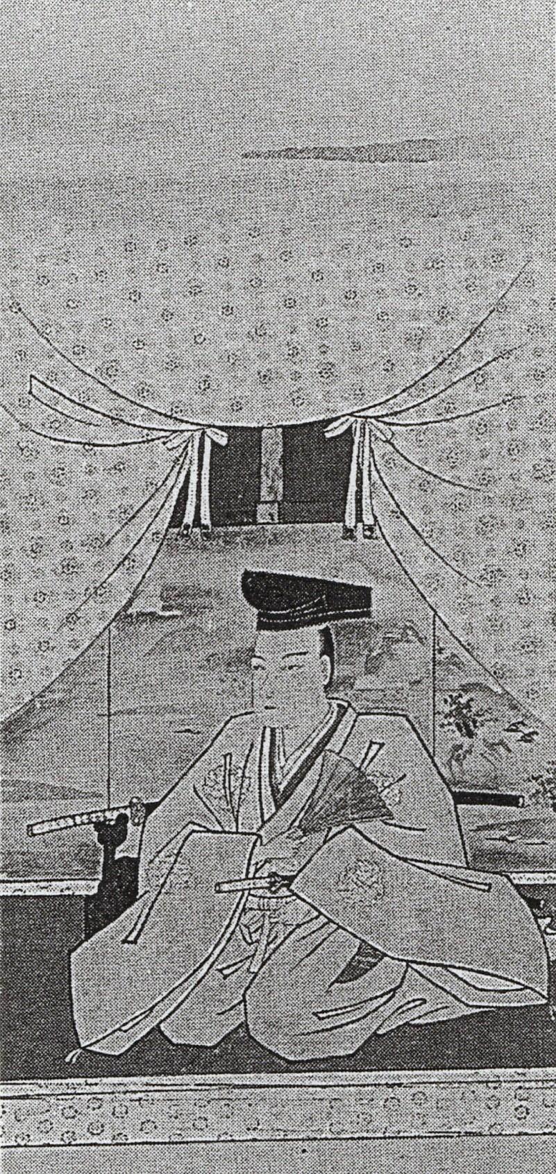 鍋島直恒の肖像(モノクロ)。